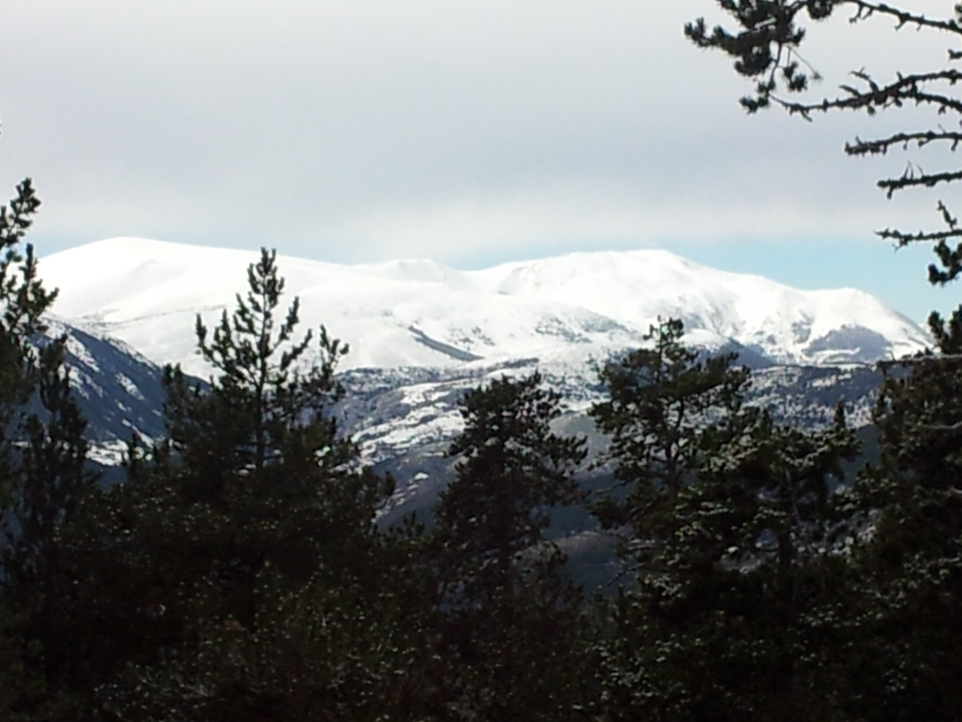 nevà,ripolles,2013,coll de les barraques,planoles